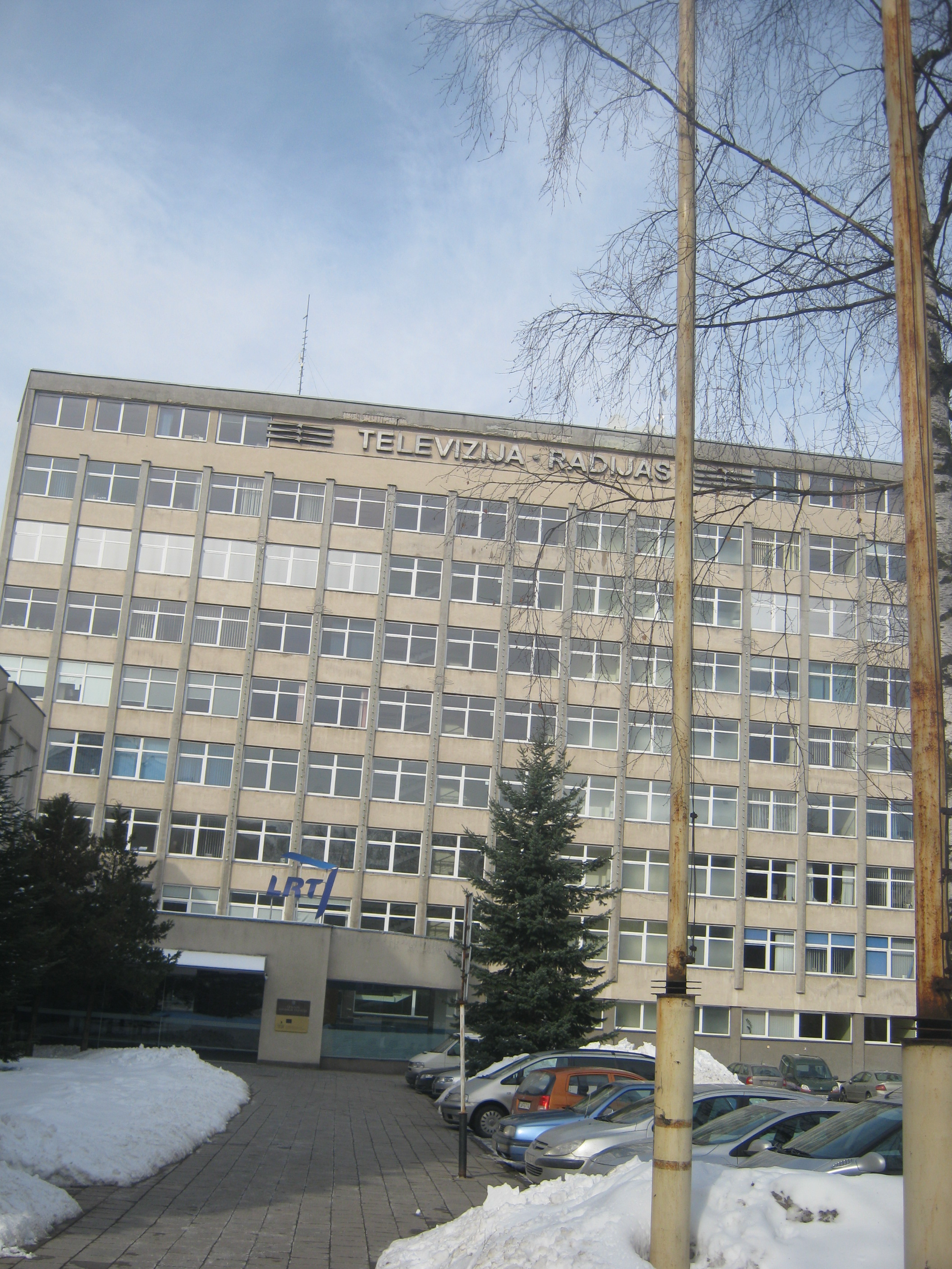 Naujamiestis, Vilnius